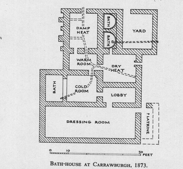 Befundplan der Lagertherme von Kastell Carrawburgh/Brocolitia, Hadrianswall (GB), Zeichung von 1873.